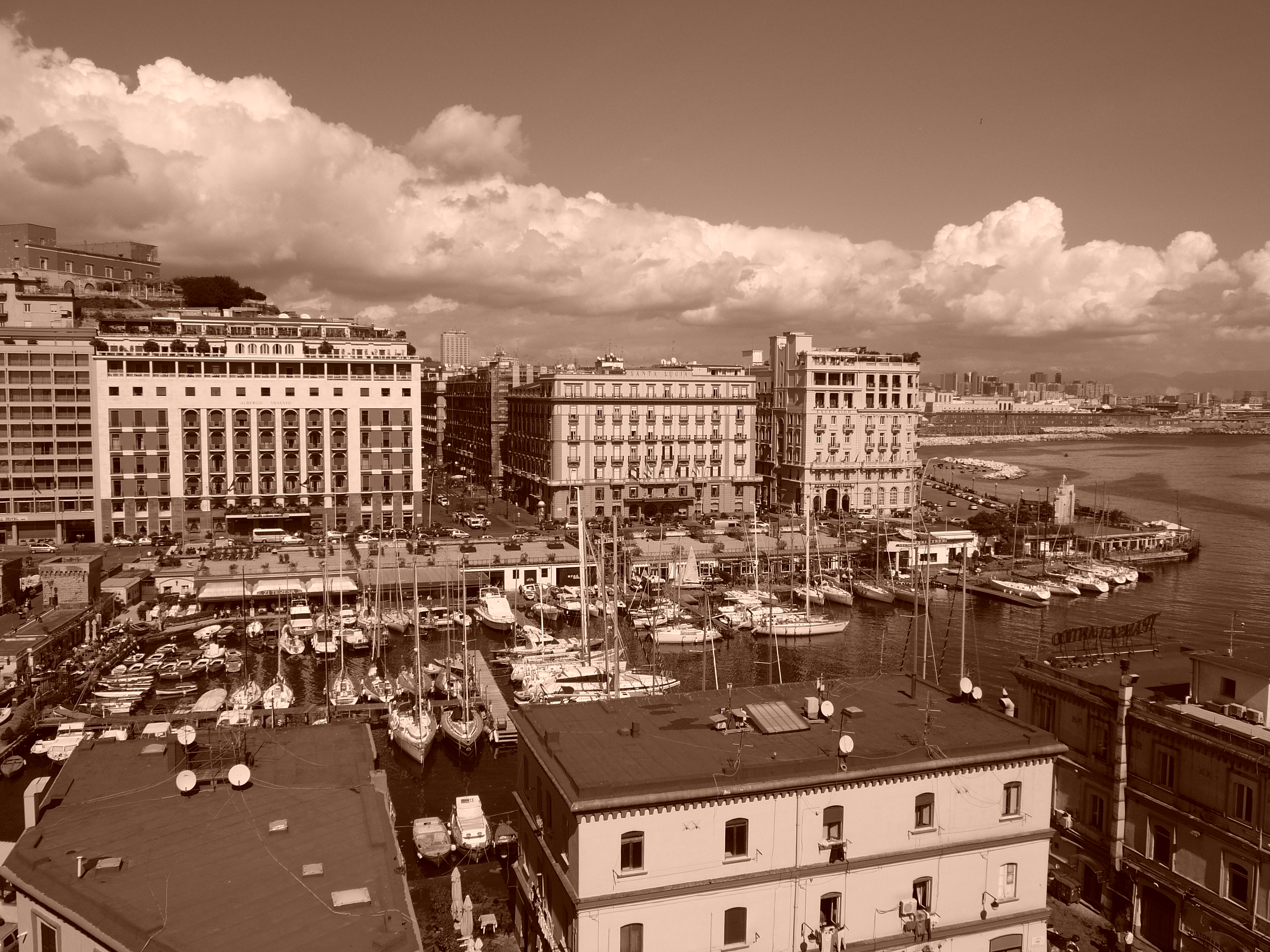 I lussuosi alberghi della Riviera di Santa Lucia (Napoli), tra i quali il famoso Albergo Vesuvio. Foto scattata da Castel dell'Ovo. Autore foto: Roberto De Martino